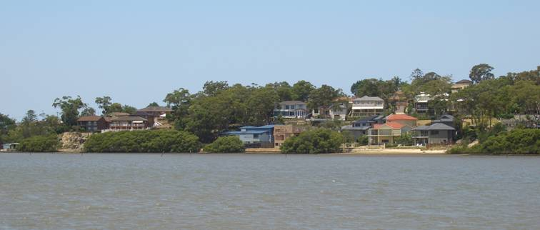 Kangaroo Point